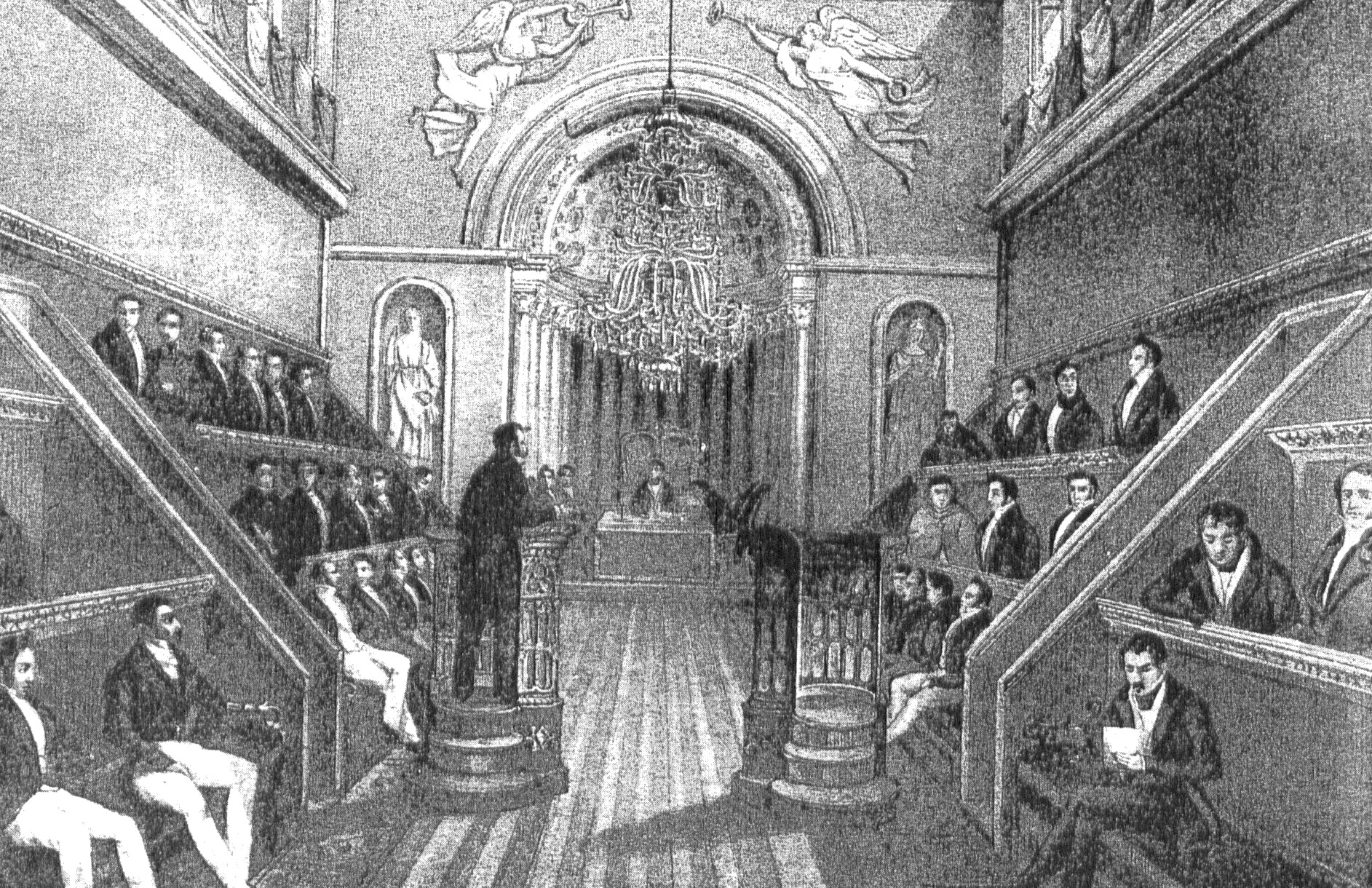 Funcionamento del Estamento de Próceres durante la regencia de María Cristina de Borbón